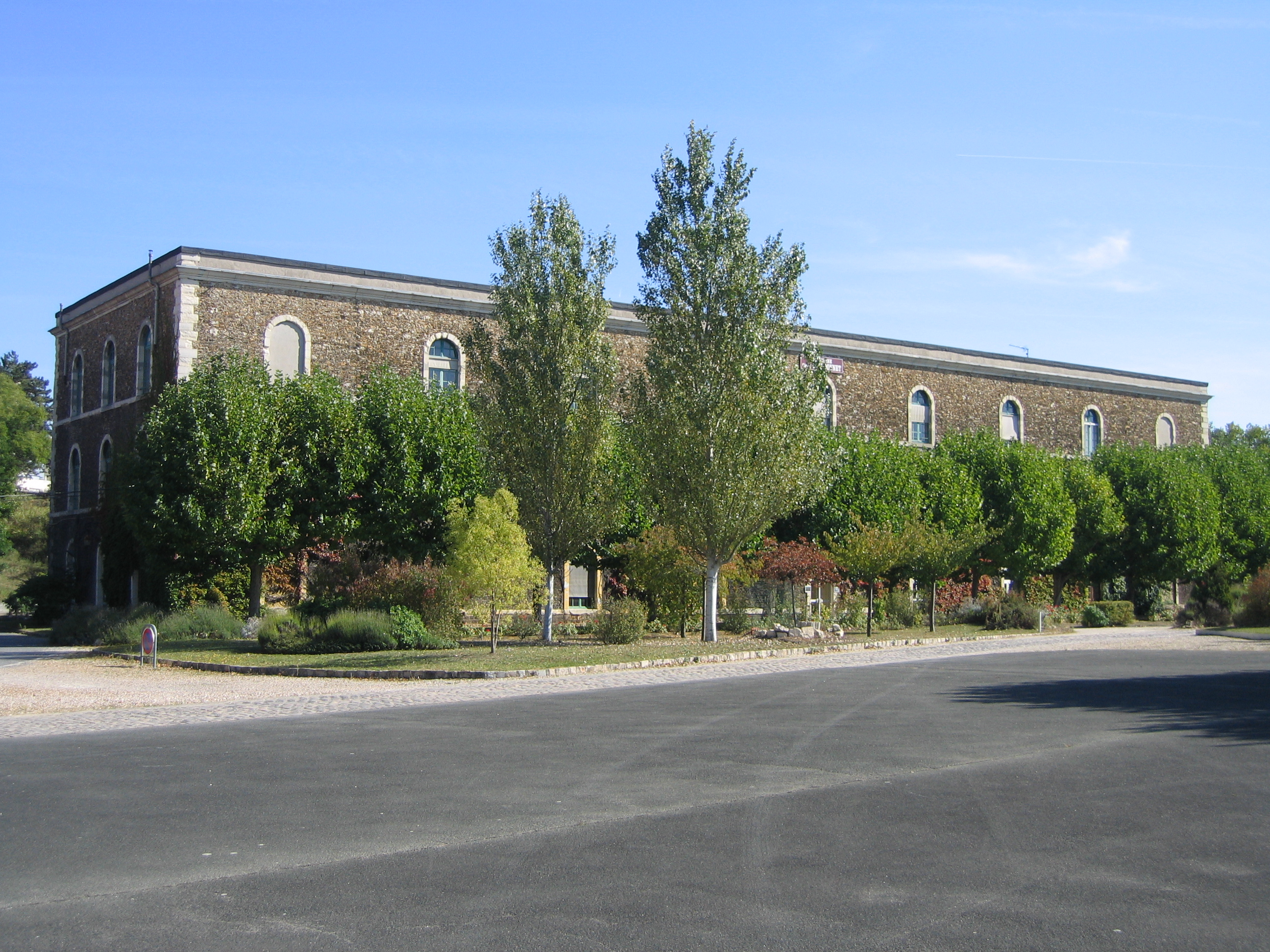 Deuxième caserne